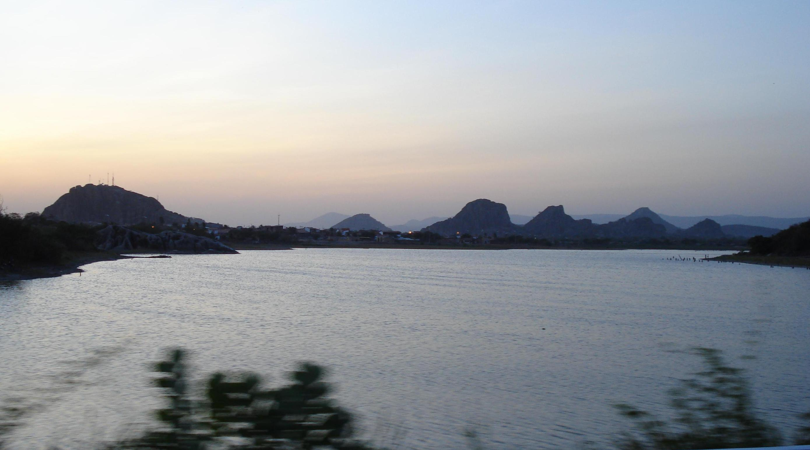 Açude do Eurípedes ao anoitecer. Quixadá, Ceará, Brasil.